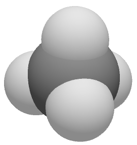 Molekulenn : metan (CH4) Meziant : Seemol Doare taolennañ : Leuniadur, 75% Van Der Waals, drekleur gwenn